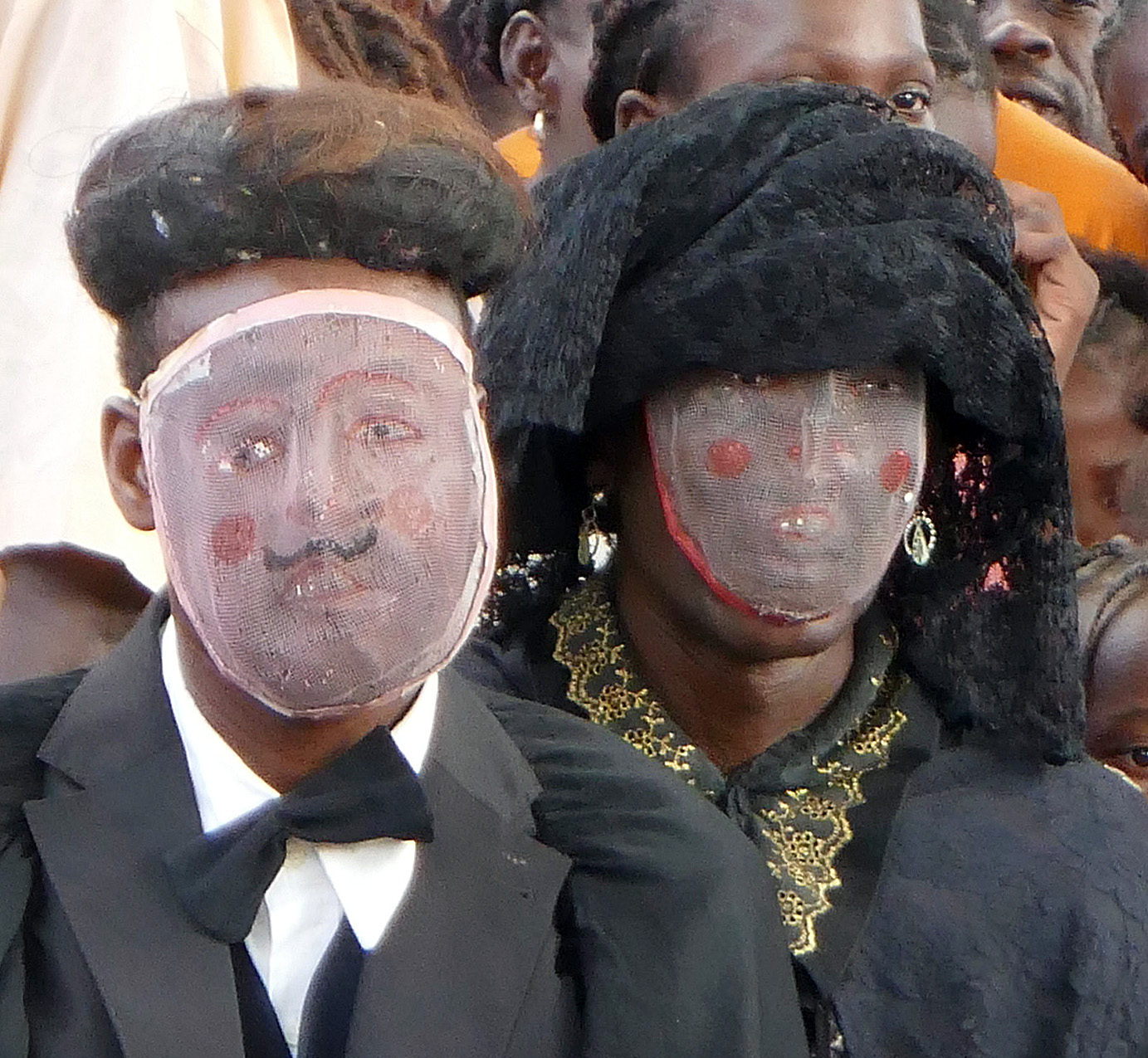 Masques de Tchiloli lors d'une représentation devant la chapelle São Pedrão de São Tomé à l'occasion de la fête patronale. Le tchiloli est une forme théâtrale, musicale et dansée créée au XVIe siècle, jouée par des pêcheurs et des paysans. Traditionnellement elle met en scène la seule pièce du répertoire, La tragédie du marquis de Mantoue et de l'empereur Charlemagne.